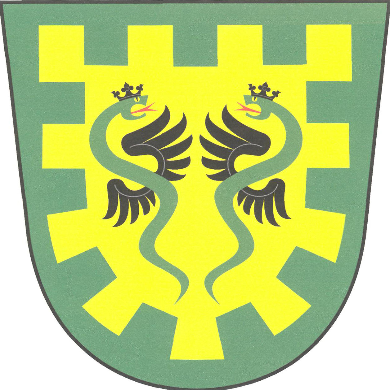 Znak obce Plazy